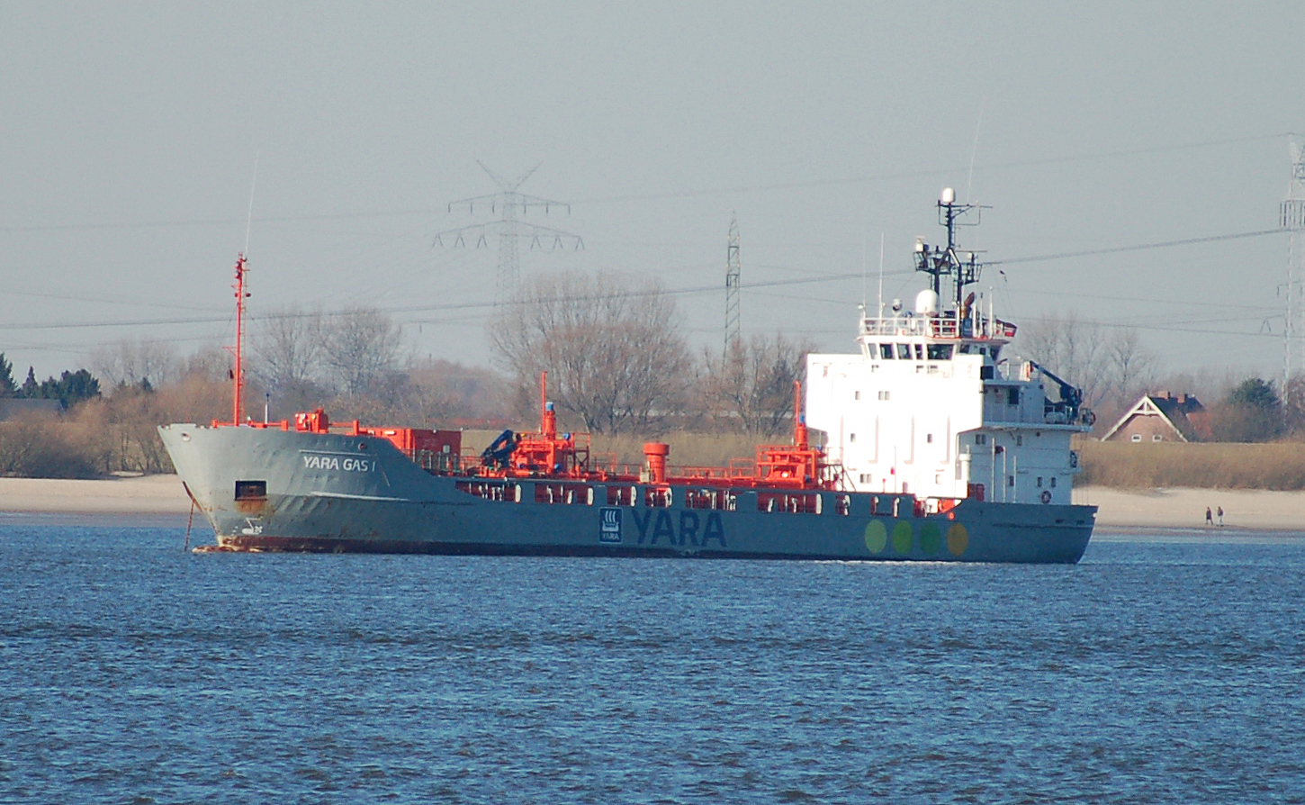 Das Tankschiff Yara Gas I auf der Elbe